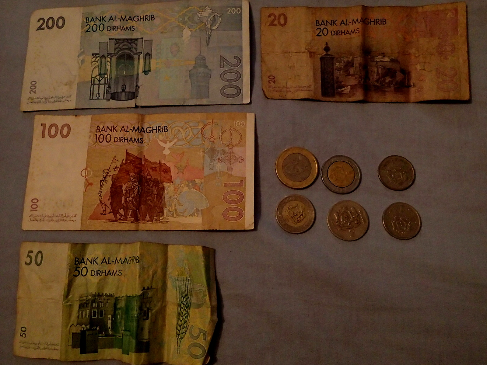 Pièces et billets, en dirhams marocains (MAD).